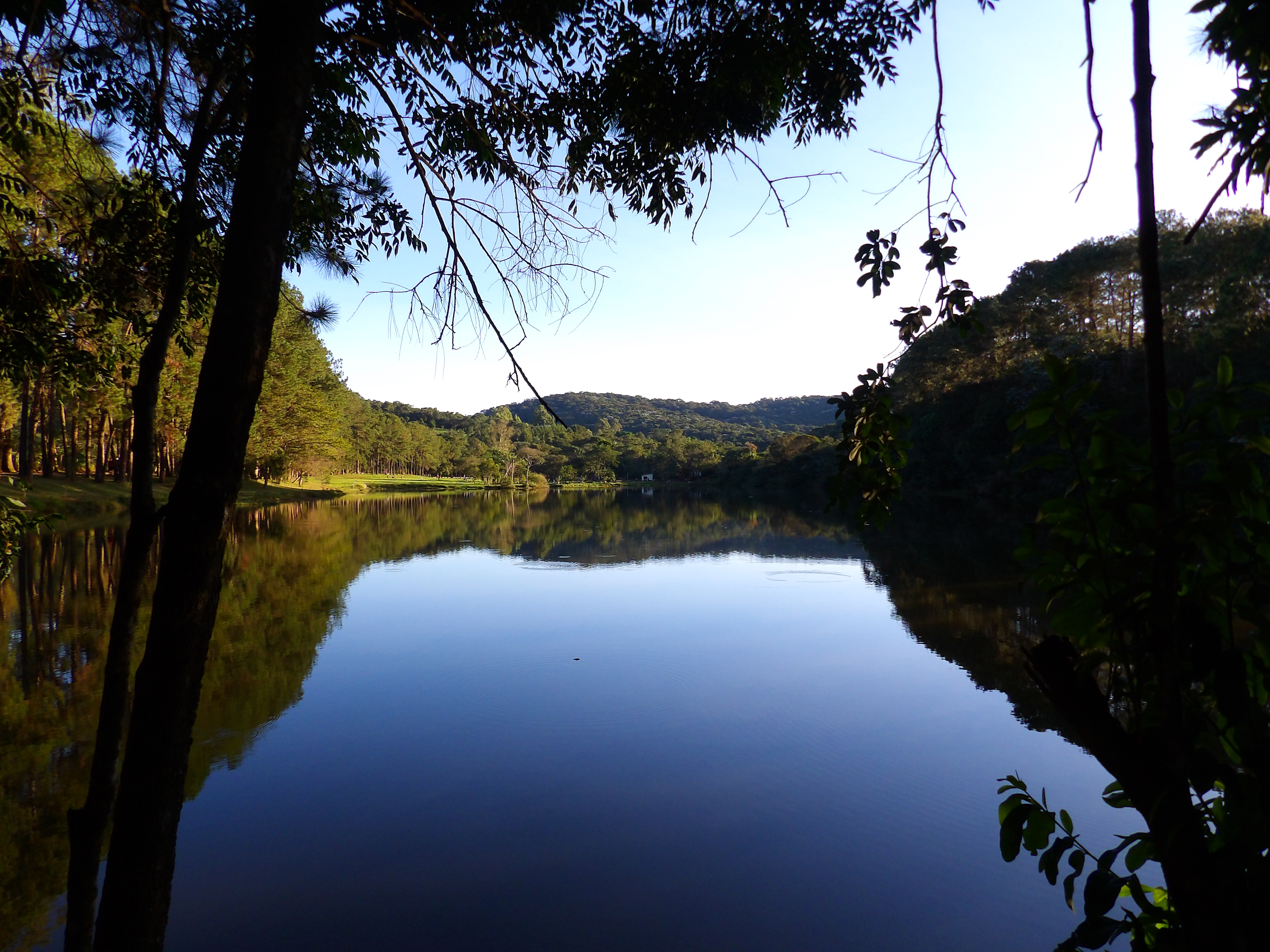 Lagoa do parque zoobotânico de Pouso Alegre